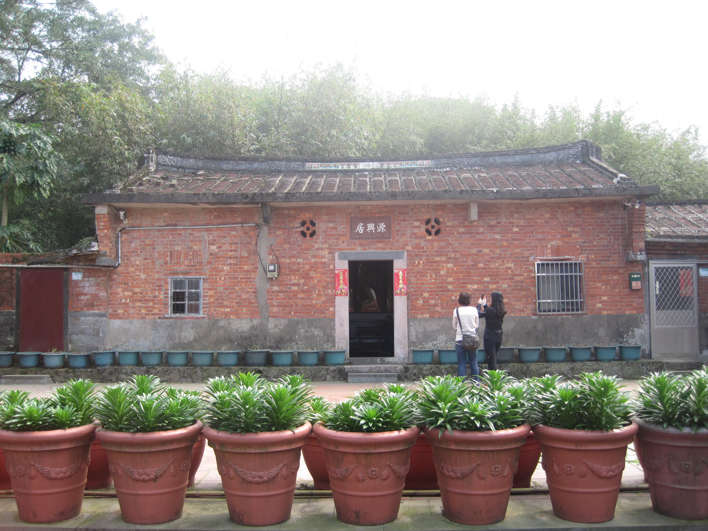 三芝源興居